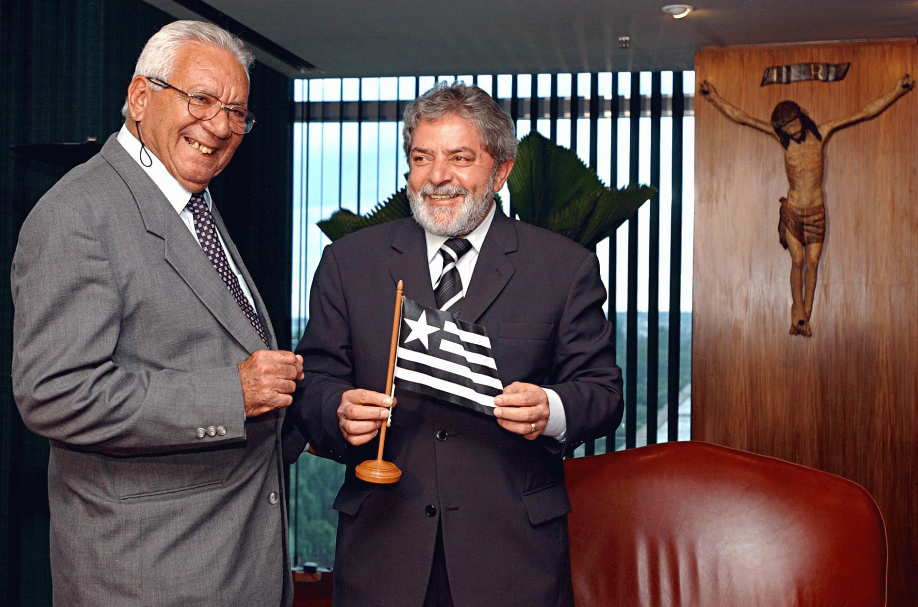 Brasília - O presidente Luiz Inácio Lula da Silva exibe bandeira que ganhou do ex-jogador do Botafogo, Nilton Santos.